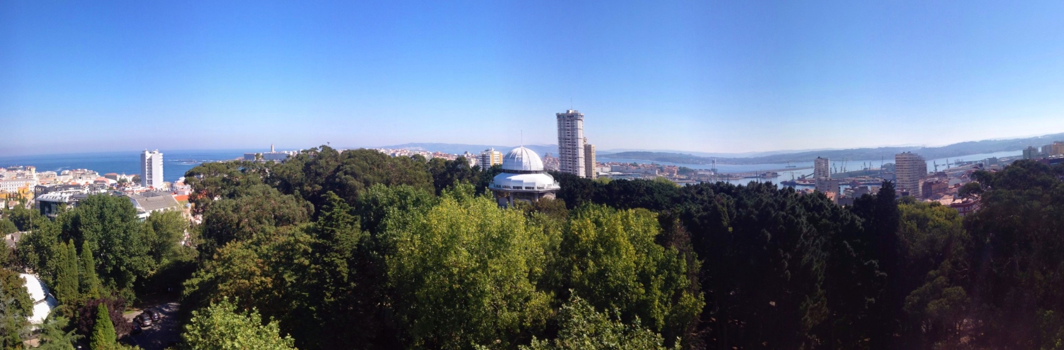 Vista de la ciudad desde un edificio de la calle Padre Sarmiento, frente al Parque de Santa Margarita